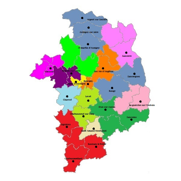 Carte des différents cantons du Cher